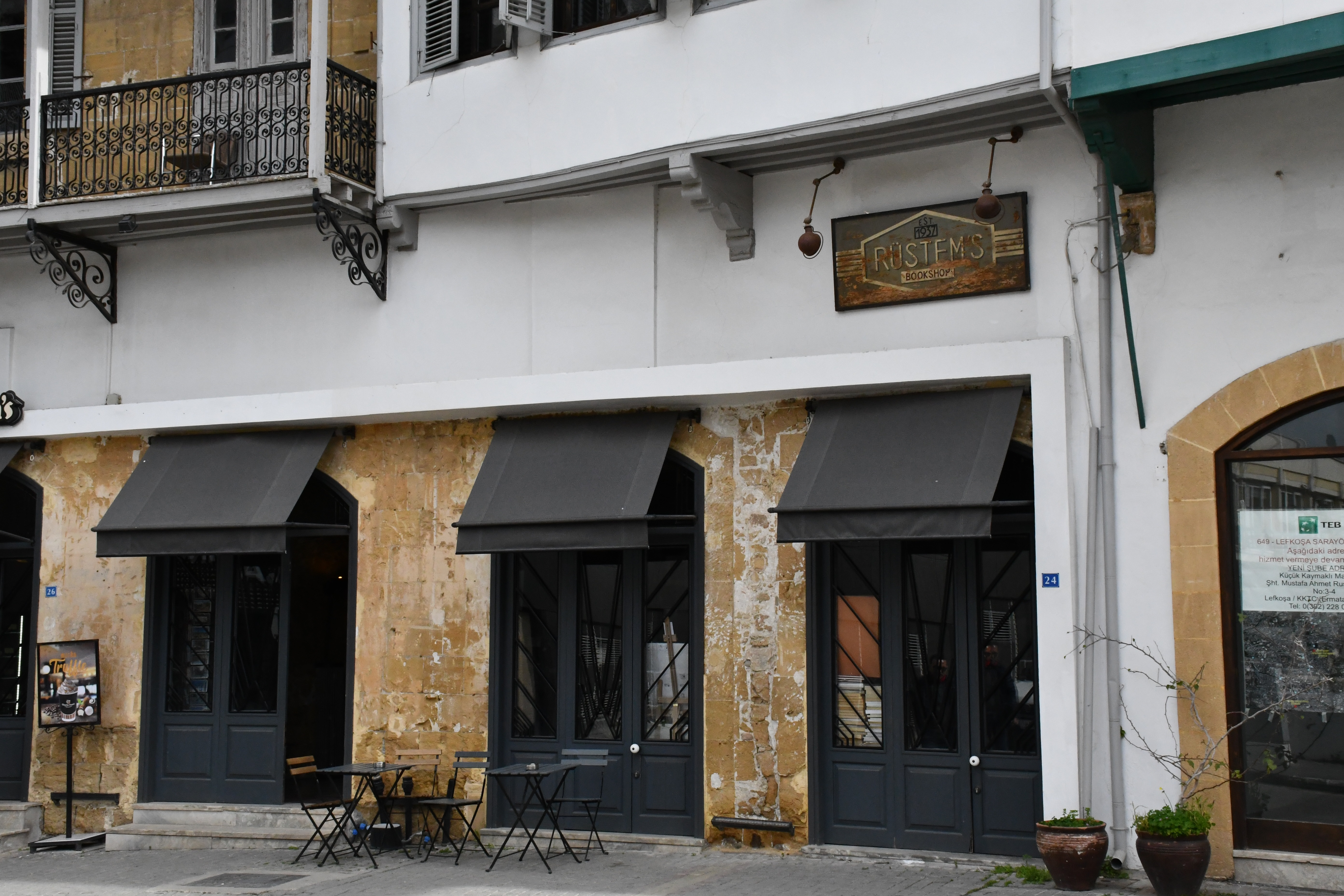 Rüstem Kitabevi'nin yola bakan ön cephesi